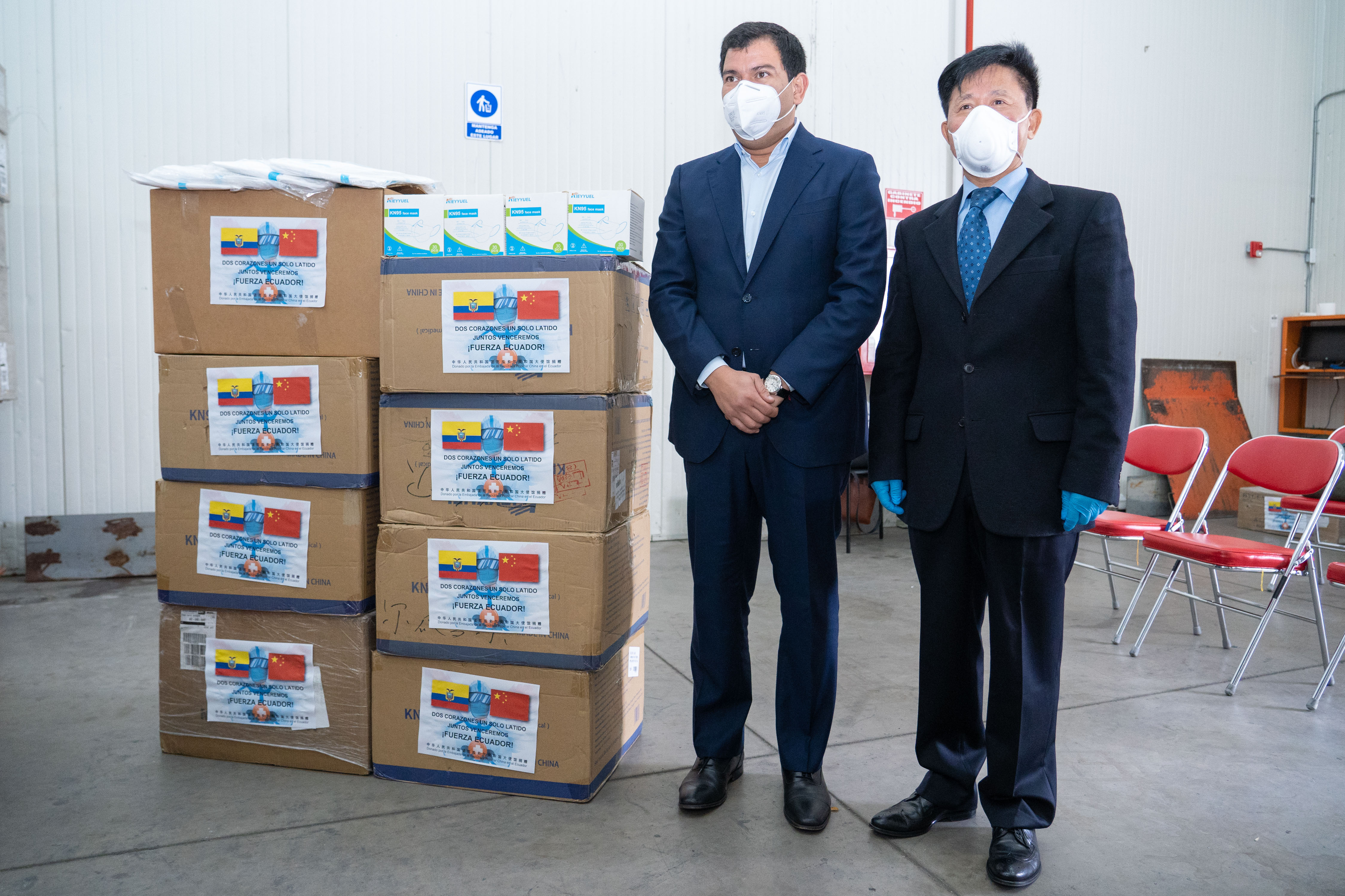 Quito, 12 de junio 2020.- Presidente de la Asamblea Nacional, César Litardo recibió de parte de la Embajada China en Ecuador y su titular el Sr. Chen Guoyou 30 mil mascarillas médicas, 5 mil mascarillas KN95 y 150 trajes y gafas de protección para ser distribuidos entre los ciudadanos más vulnerables del Ecuador. Se firmo un acta de entrega / recepción de la donación. Fotos: Alexander Moya / Asamblea Nacional